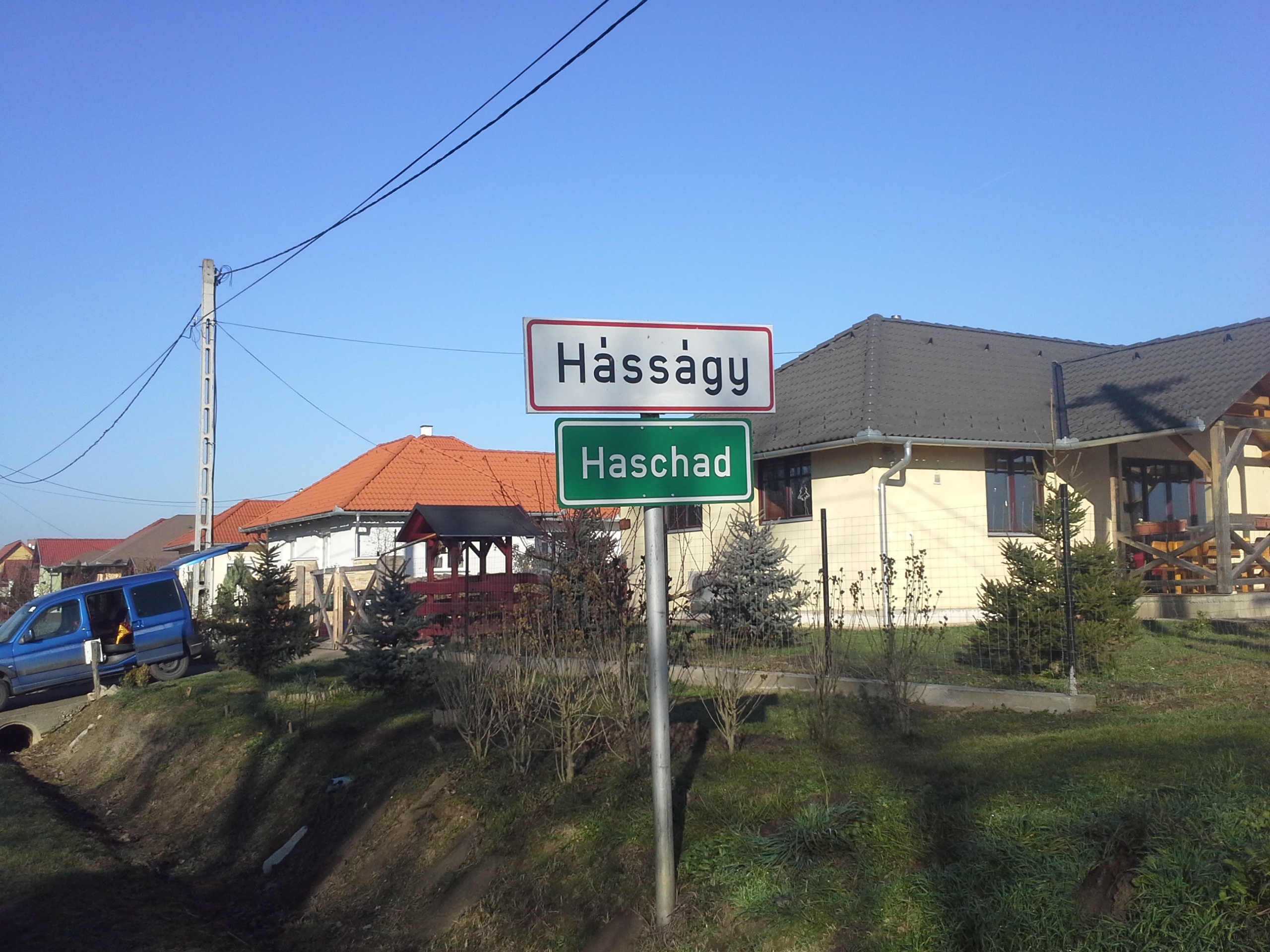 Hásságy tábla